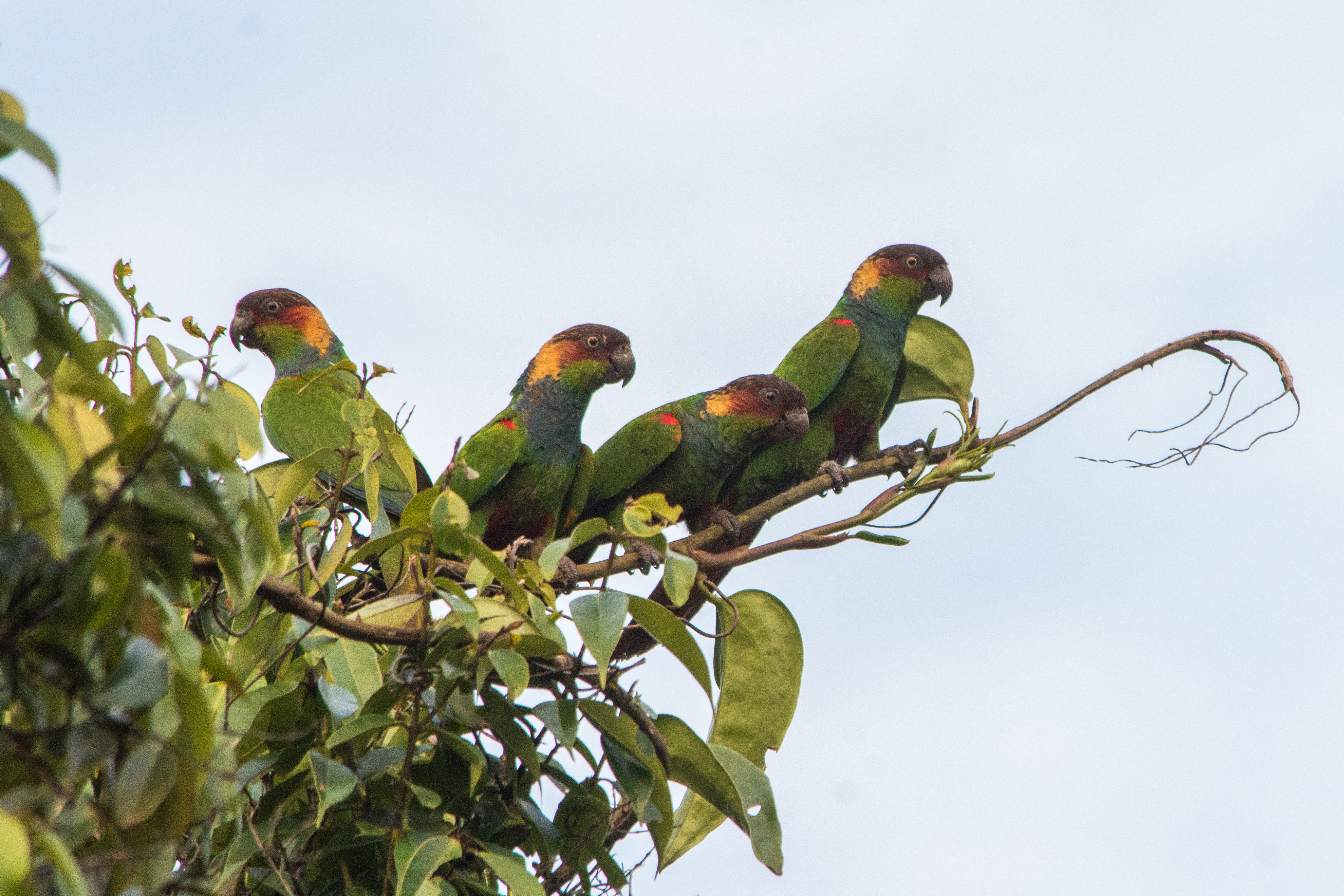 A tiriba-grande (Pyrrhura cruentata) é endêmica da Mata Atlântica brasileira e ameaçada de extinção. No Parque Nacional do Pau Brasil a tiriba-grande pode ser facilmente observada nas matas ao redor dos mirantes.